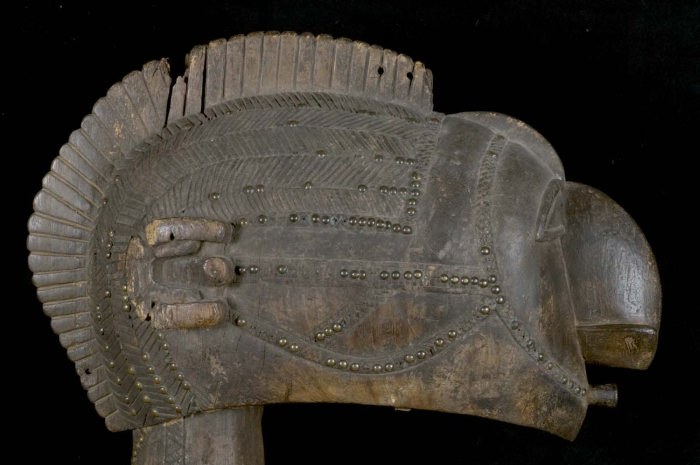 Het masker is vervaardigd in de vorm van een vrouwenhoofd met torso en stelt Nimba voor, de belichaming van de vruchtbaarheid en de cultusgeest van het Simo-genootschap. Voor de oogst komt deze in vezelkostuum gehulde figuur te voorschijn om met het dorp te dansen.